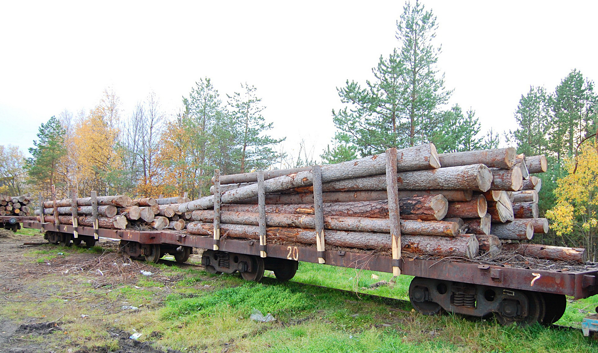 Платформы